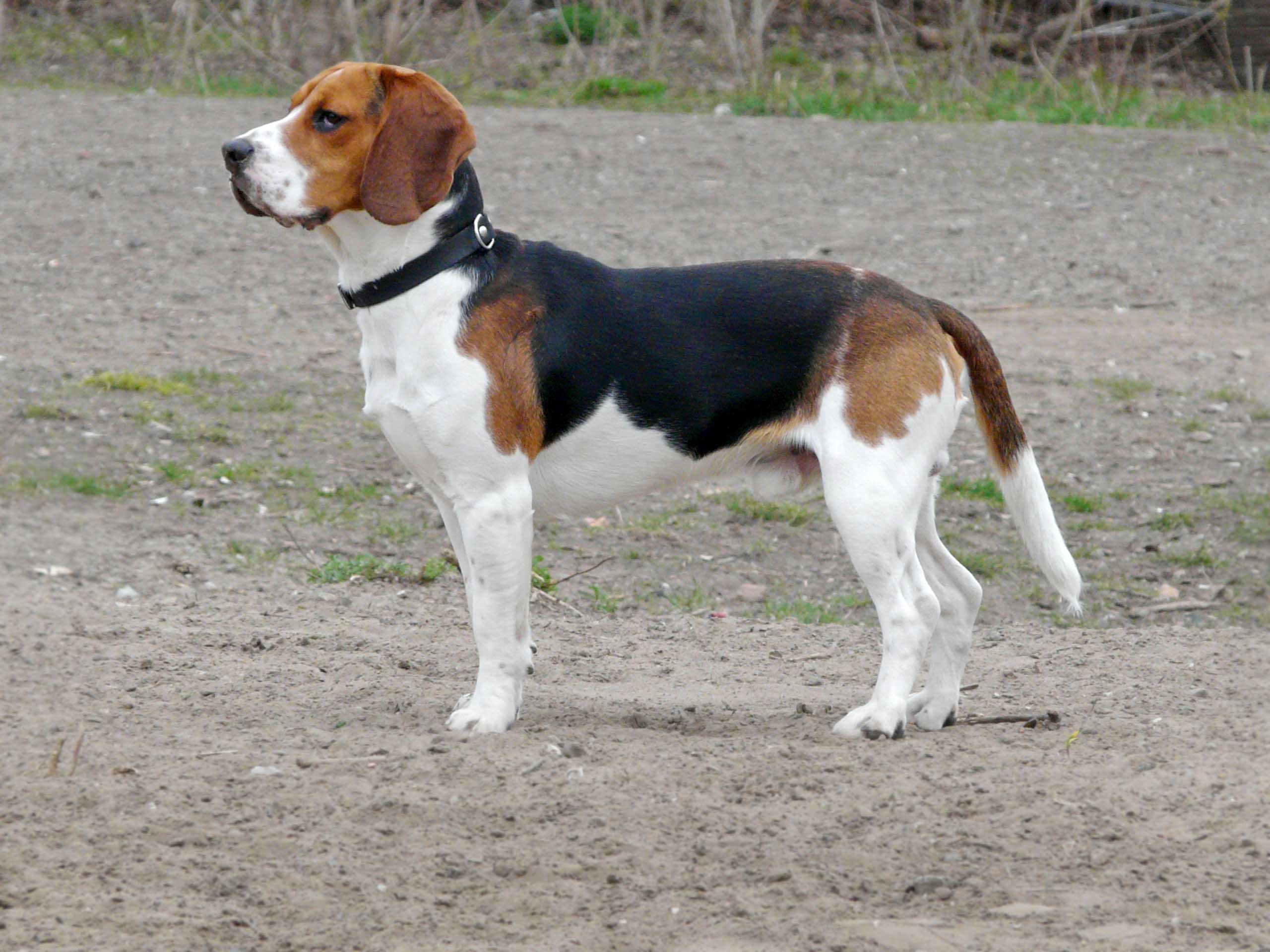 ein Jahr alter Beagle tricolor